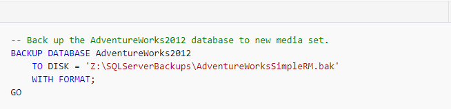 Монгол: Жишээ: Зураг-1